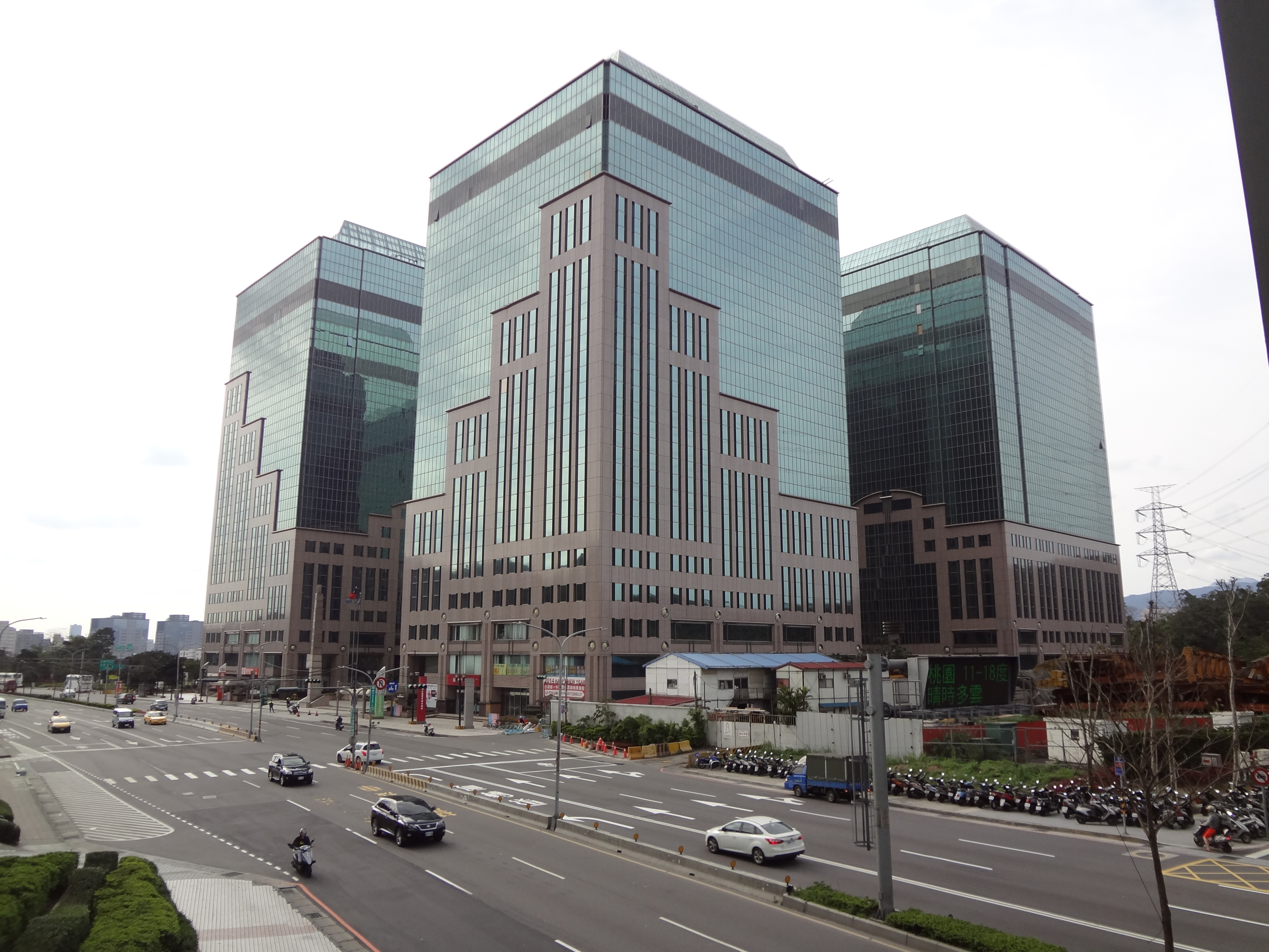 從新北市汐止區新台五路一段人行天橋上遠望遠東世界中心。